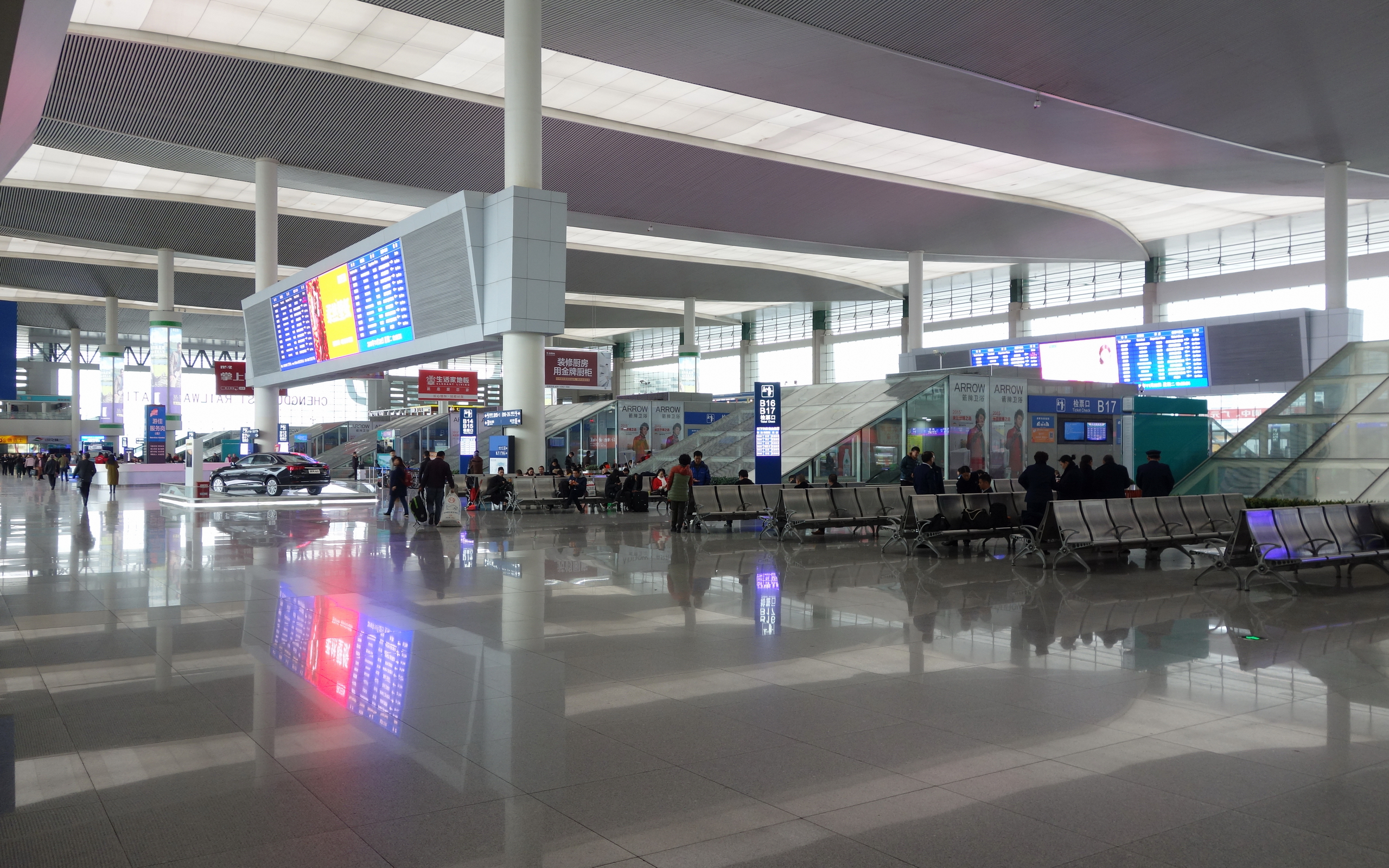 成都东站候车大厅内部